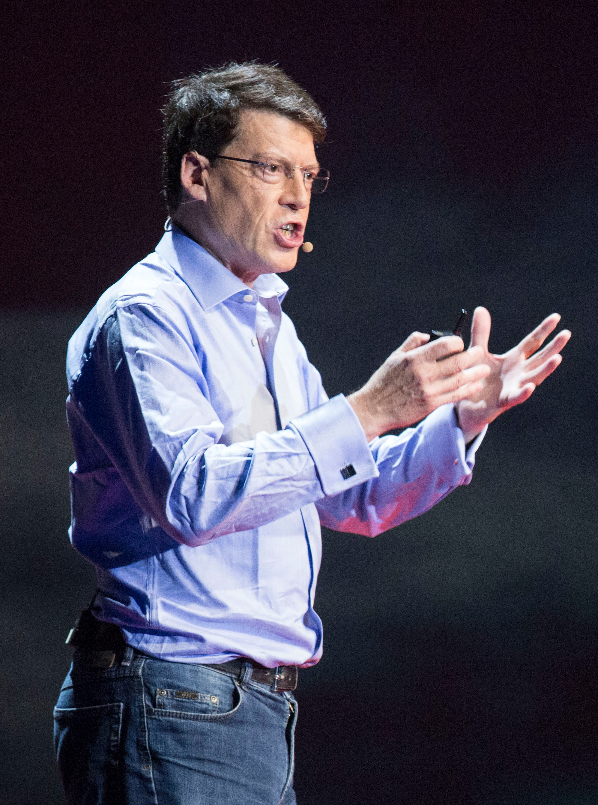 Laurent Alexandre lors d'une conférence TEXx à Paris en 2014